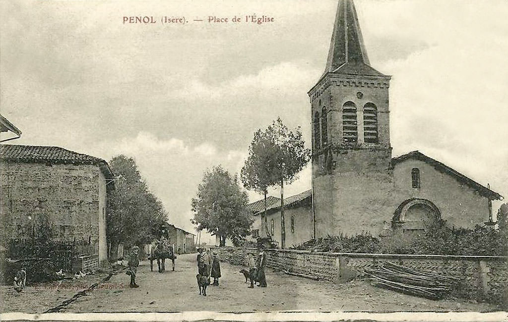 Penol (Isère) : place de l'église. Carte postale ancienne.